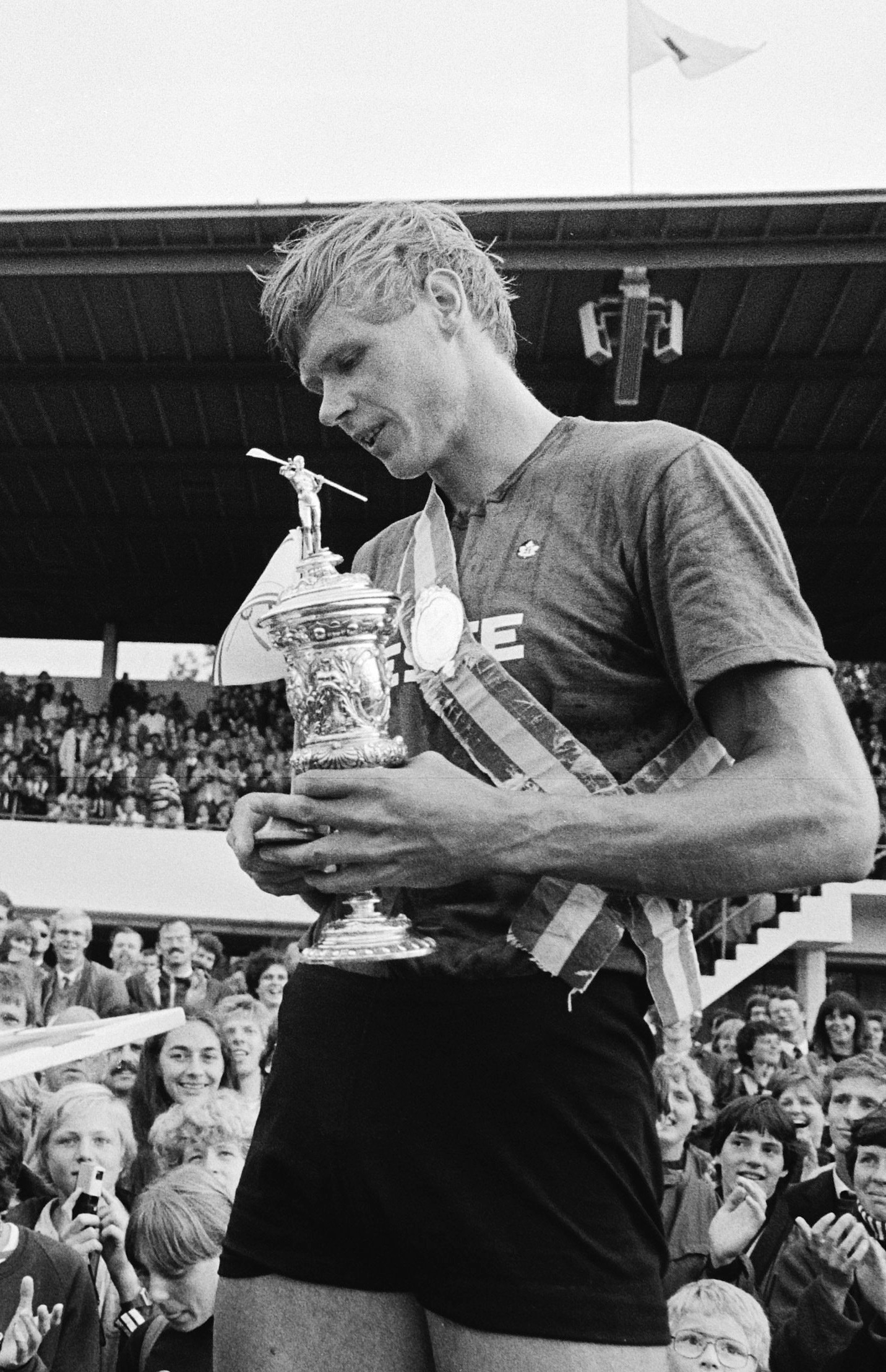 Roeien: Koninklijke Hollandbeker (Amsterdam); winnaar Karpinen (Finland) met beker